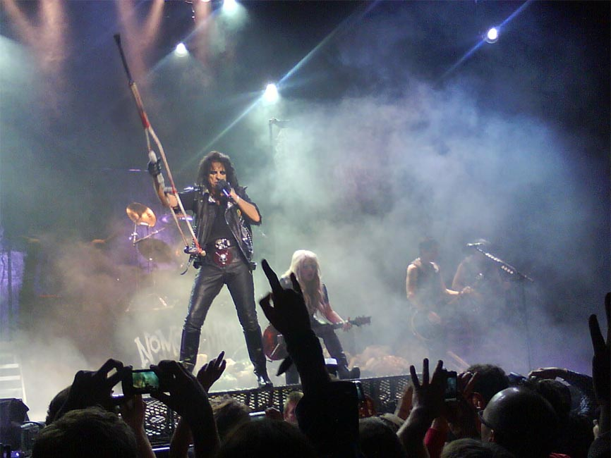 Alice Cooper en concert à Lille en 2011, lors du No More Mr Nice Guy Tour.